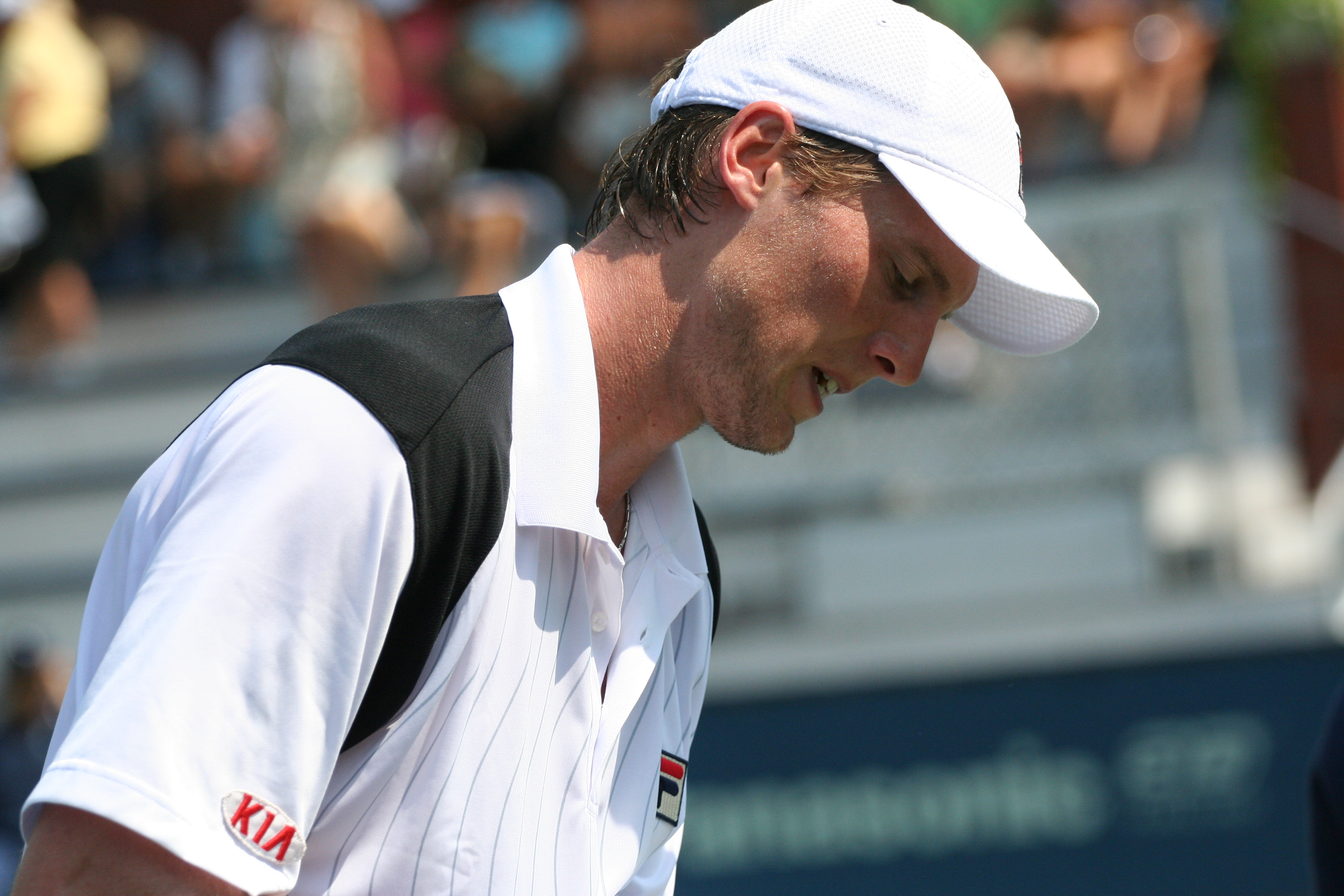 U.S. Open Sept. 1, 2010